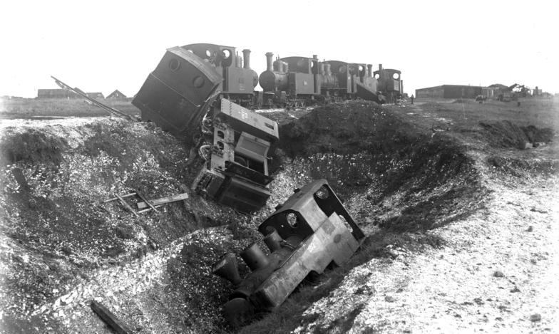 I. Weltkrieg 1914-1918 Erbeutete Kleinbahnlokomotiven in Pozieres Information added by Wikimedia users.